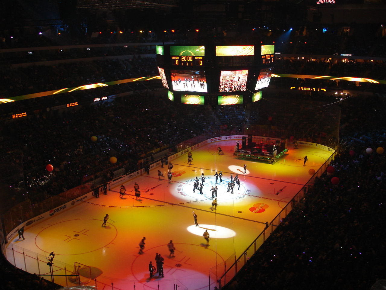 NHL All Star Game